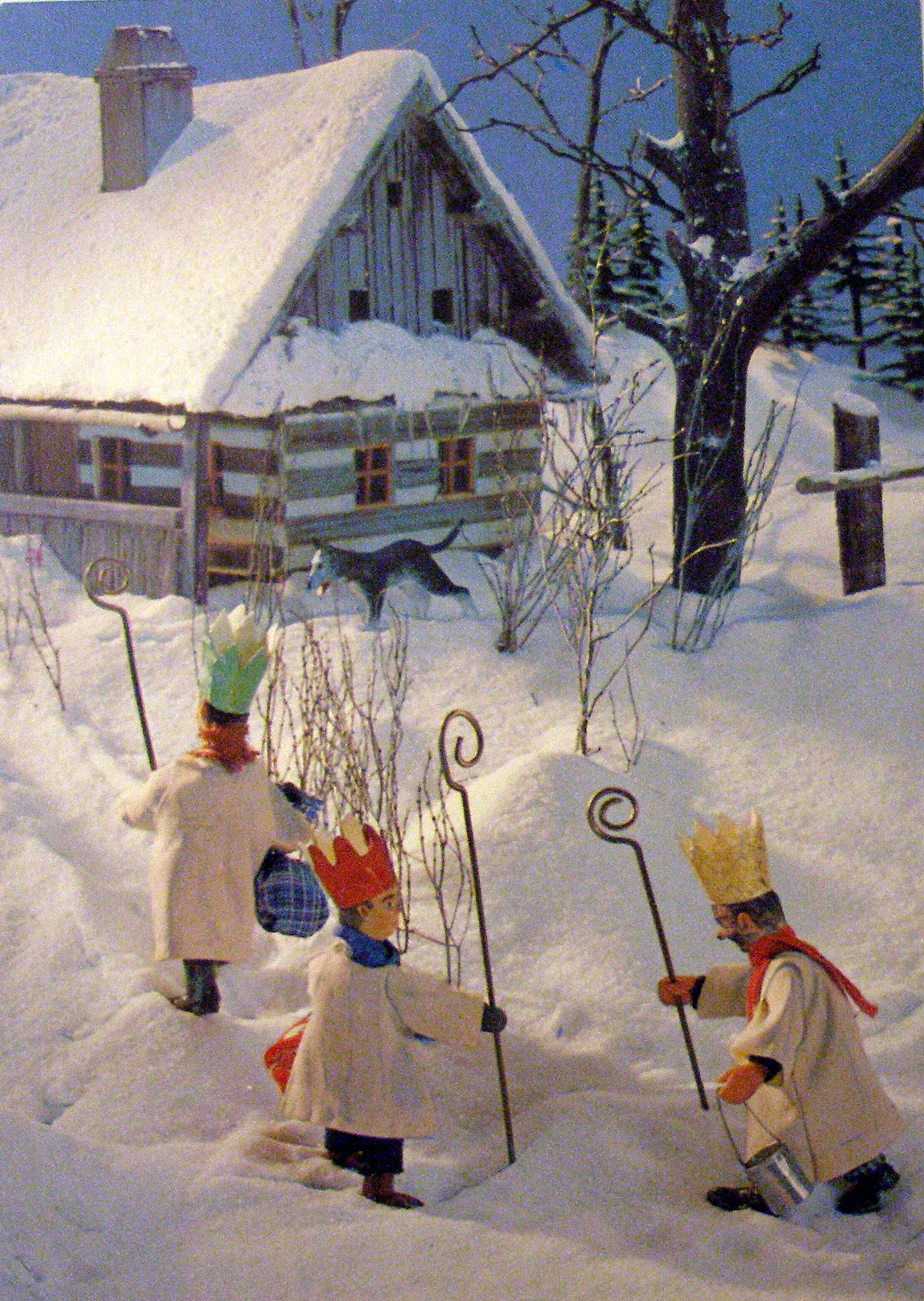 Jasličkári, betlehemci či koledníci na dedine. Animácia neznámeho autora.